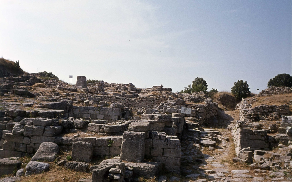 Troja Hissarlik Türkei Troy Hisarlik TurkyTroja01